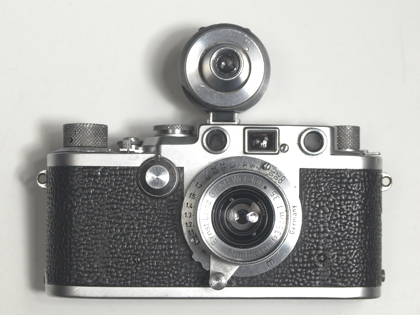 Leica IIIf de 1952 avec son viseur additionnel.